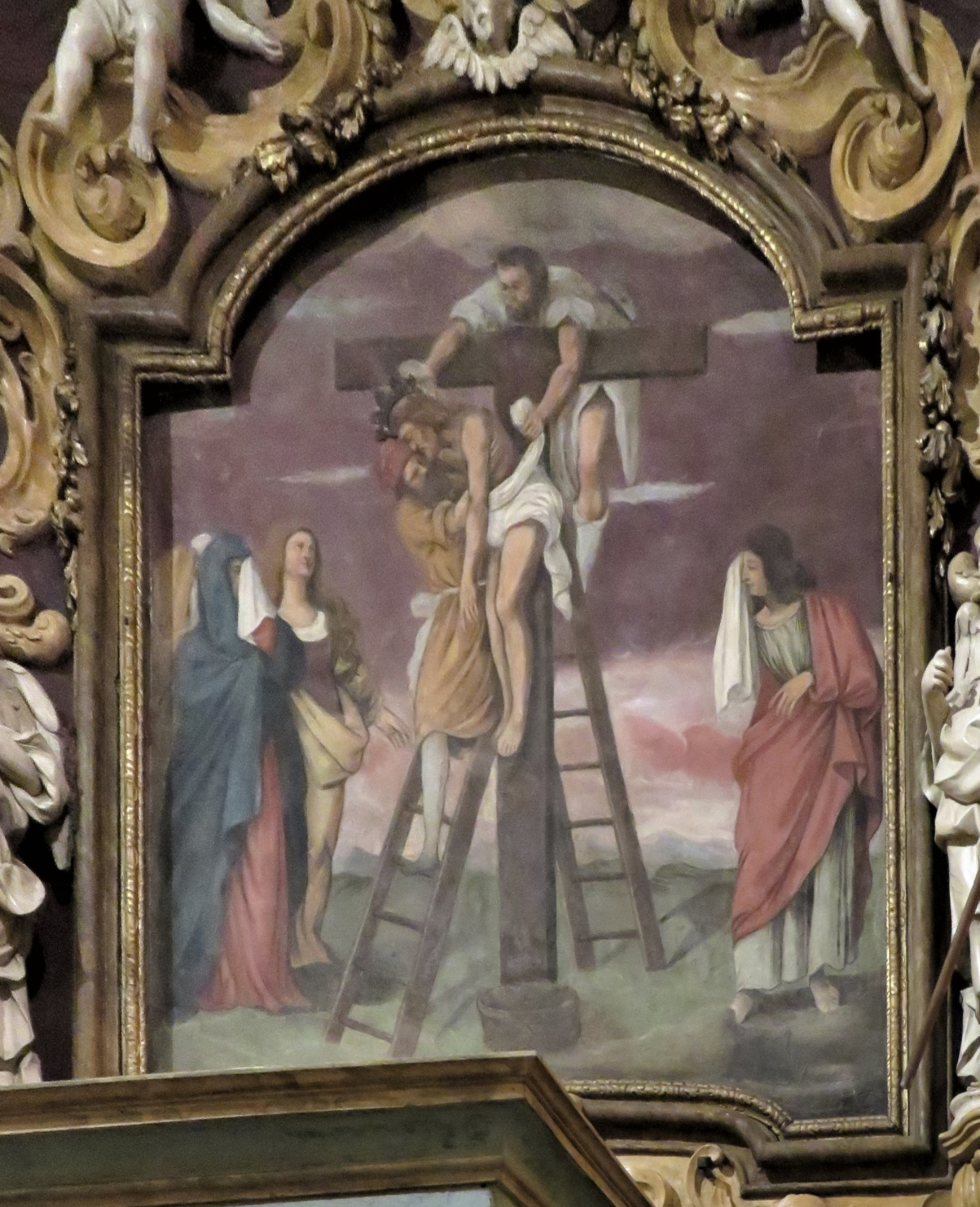 Carpi. Chiesa del Santissimo Crocifisso. Altar maggiore. Immagine raffigurante la Deposizione dalla Croce